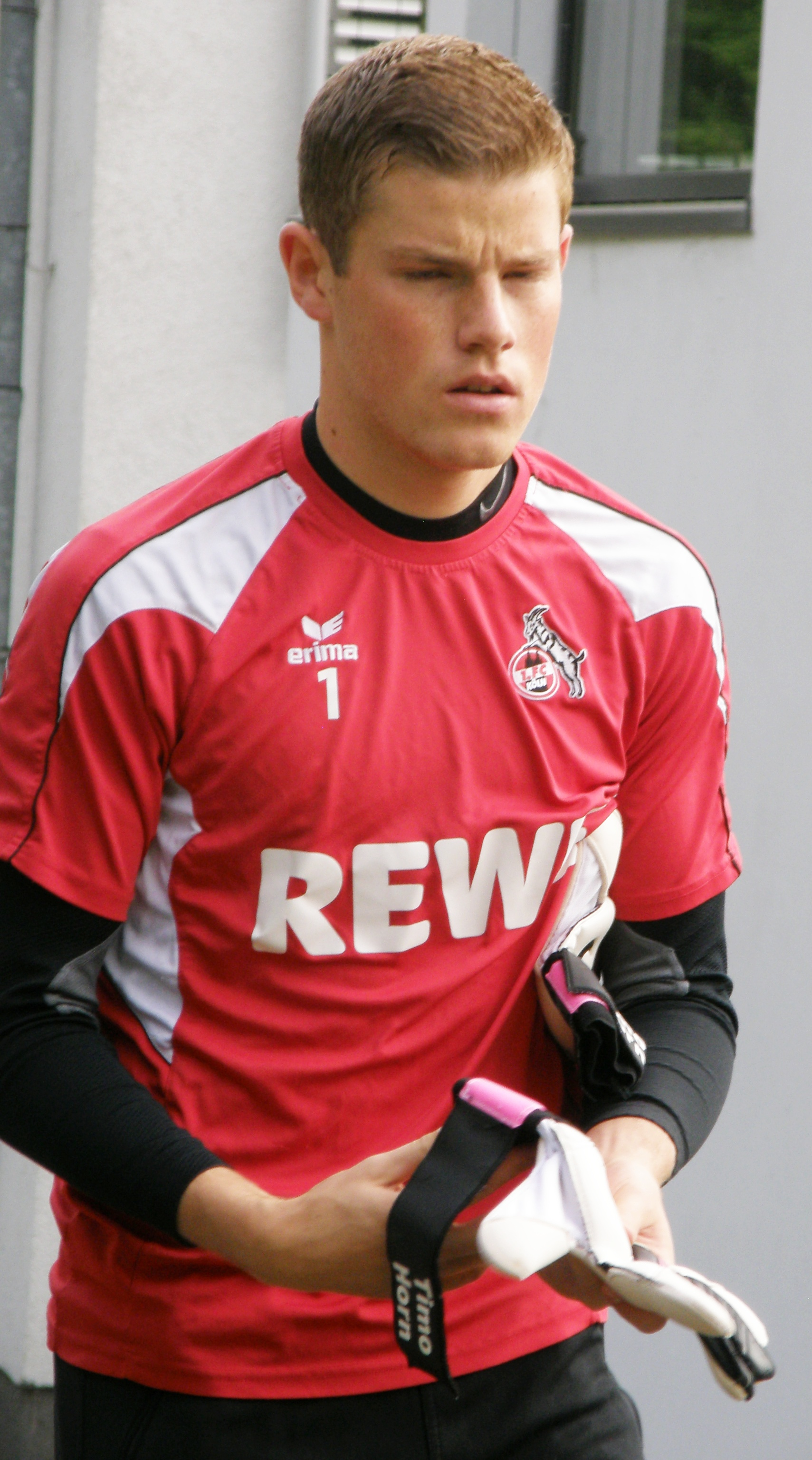 Timo Horn (2013)